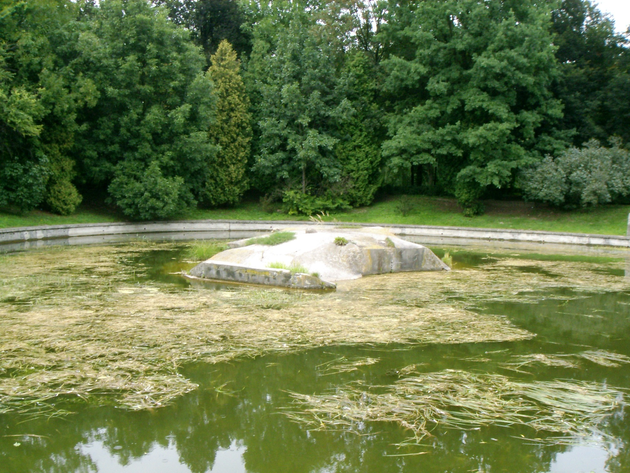 Park w Zamościu. Sztuczna wyspa dla foki umożliwia zaspokajanie pragnienia ptakom.